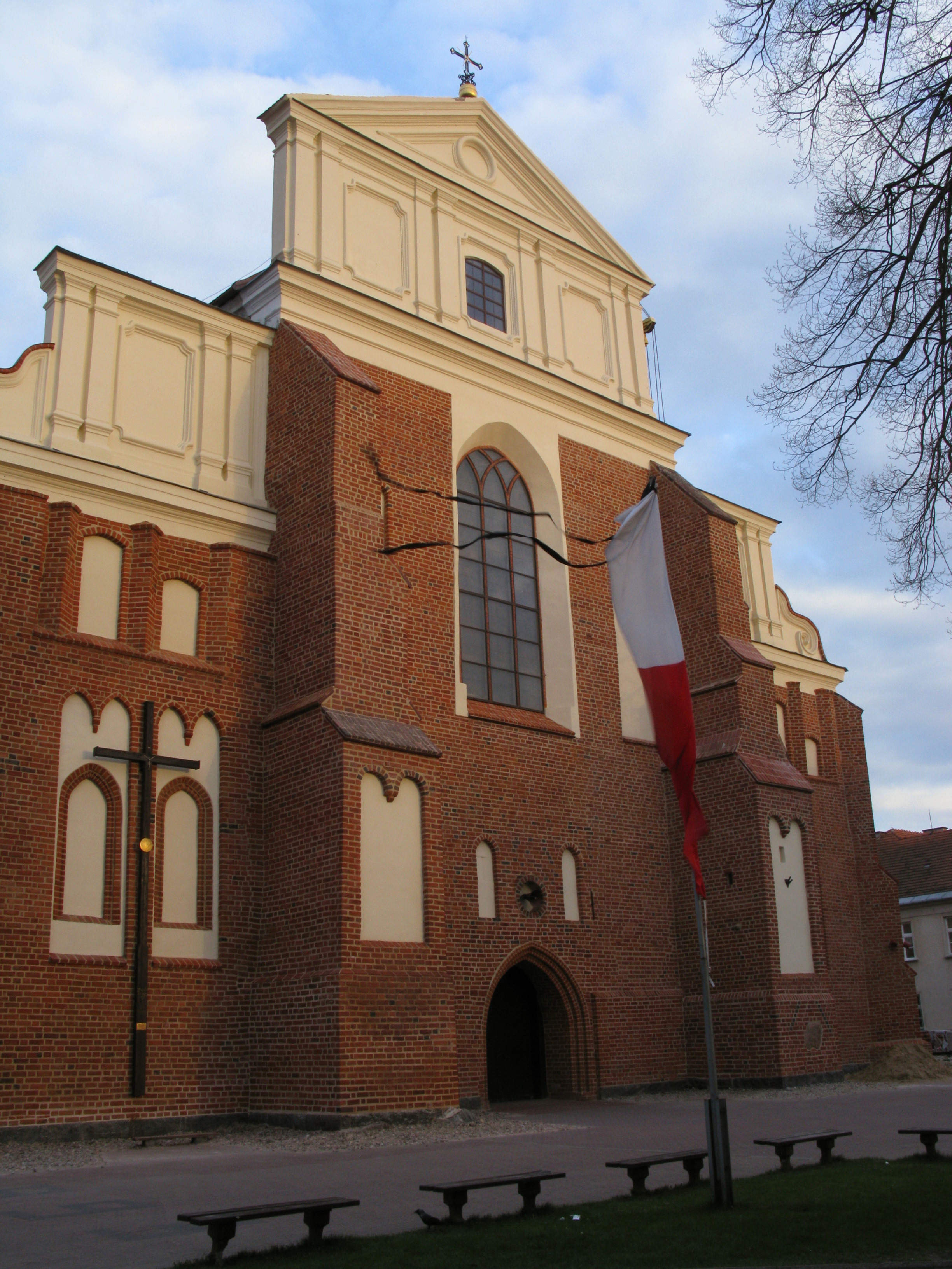 Fasada frontowa Katedry św. Michała Archanioła w Łomży